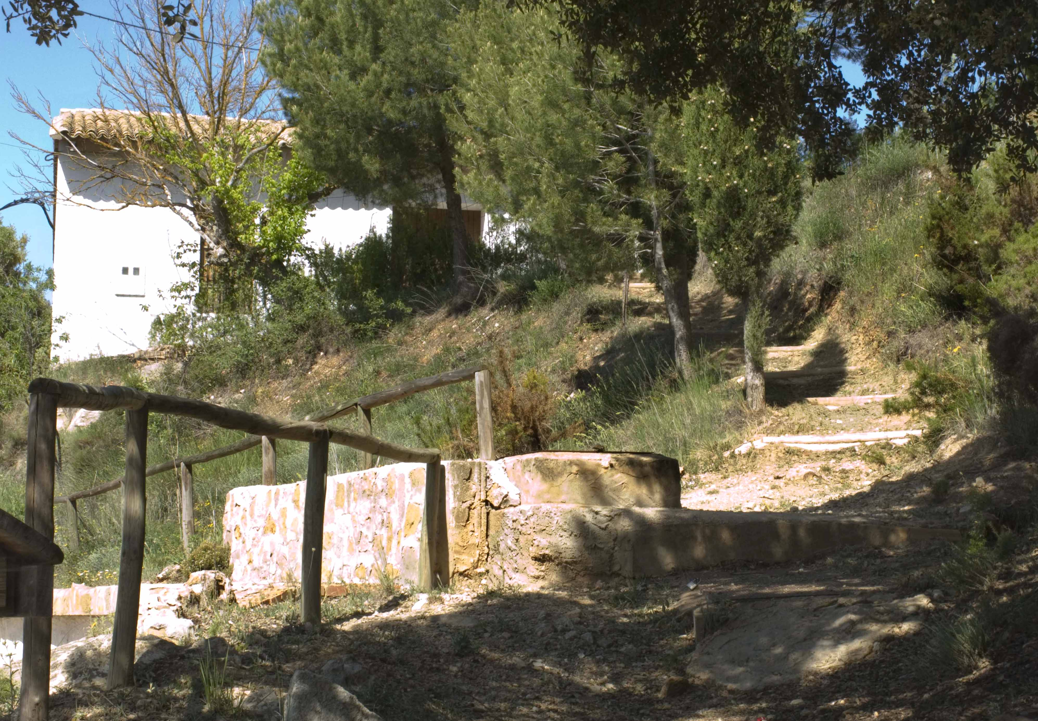 Villar de Olmos, de Requena, un municipi del País Valencià